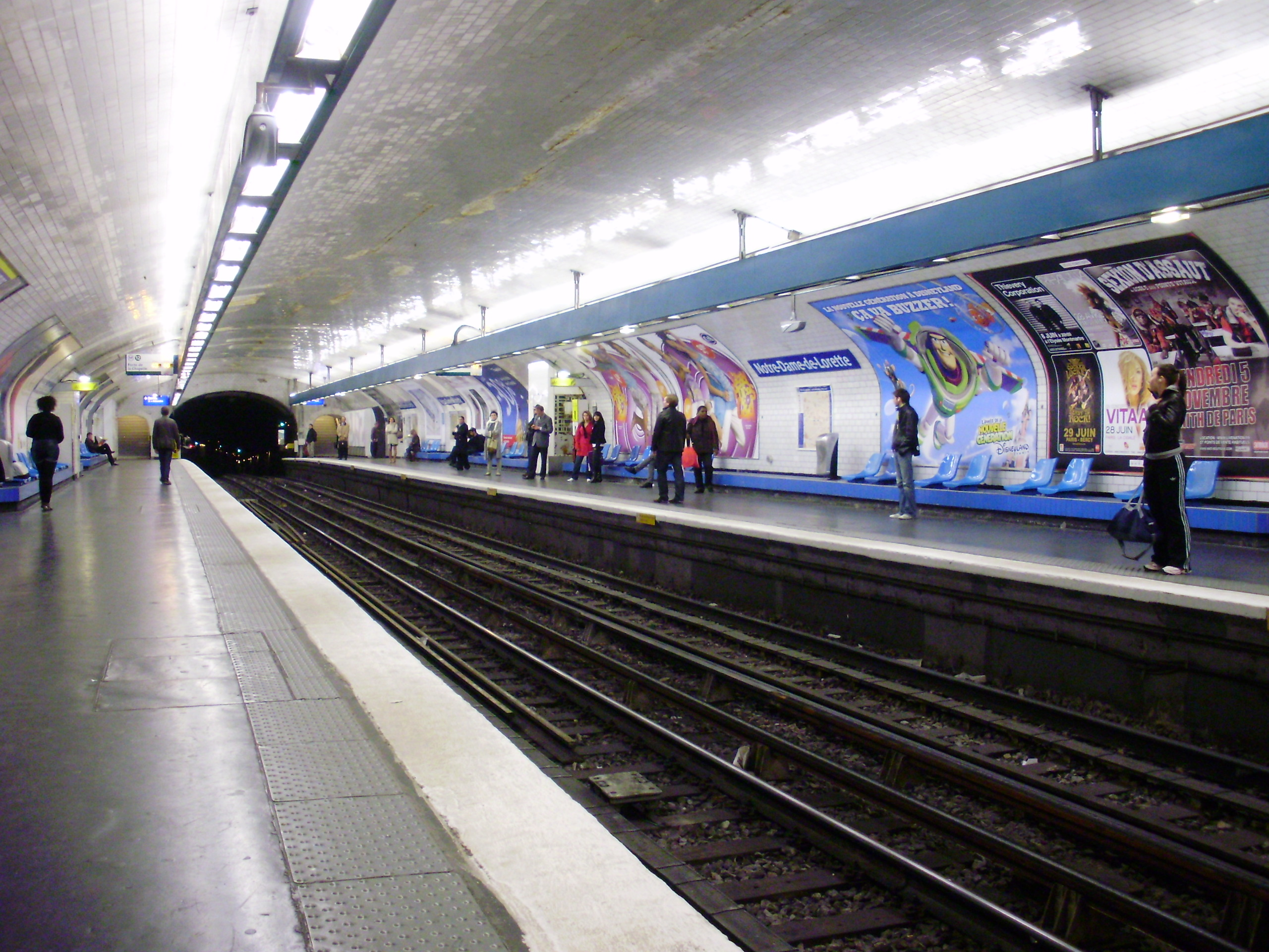 Quais de la station Notre-Dame-de-Lorette du métro de Paris